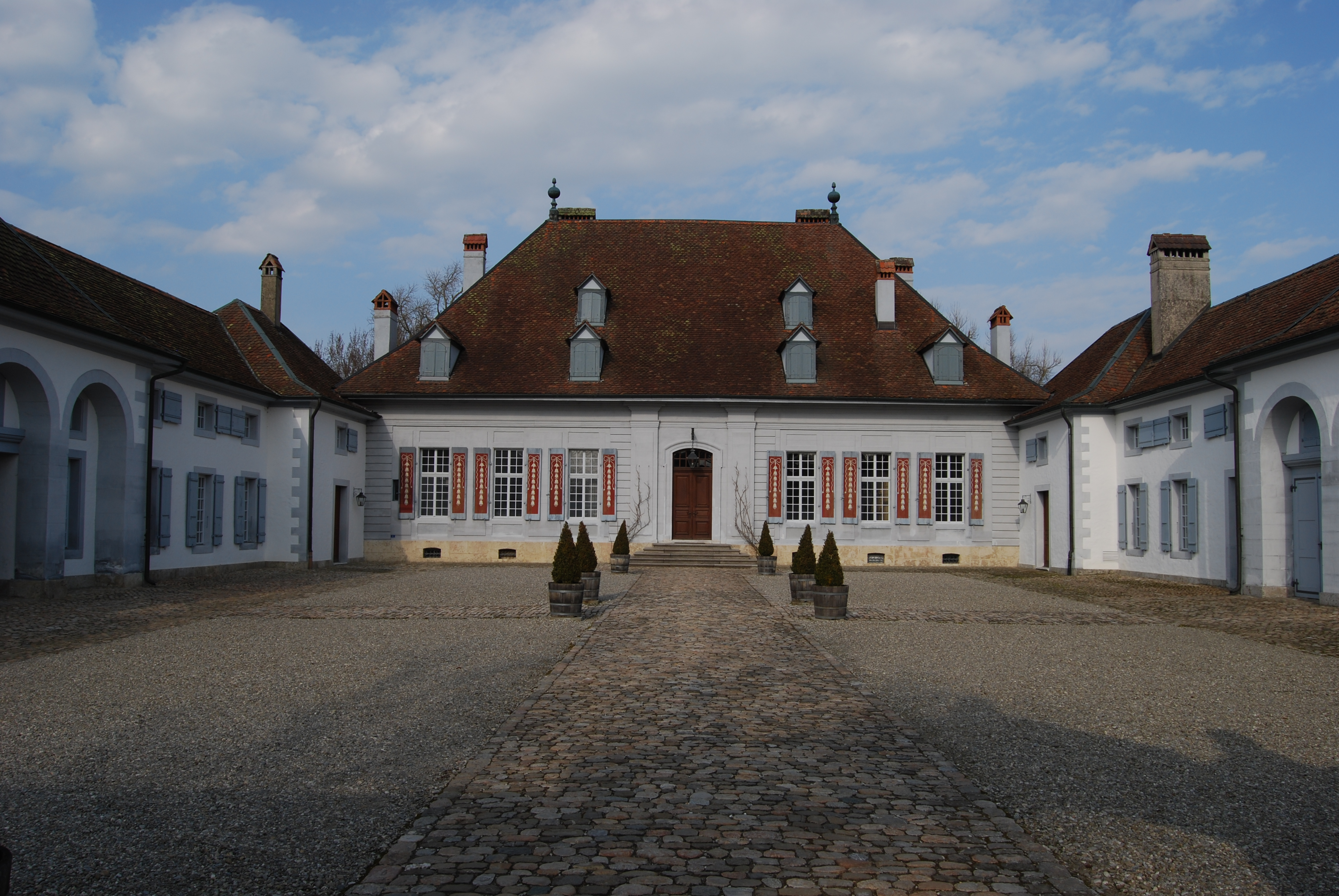 Kastelo Thunstetten, Kantono Berno, Svislando